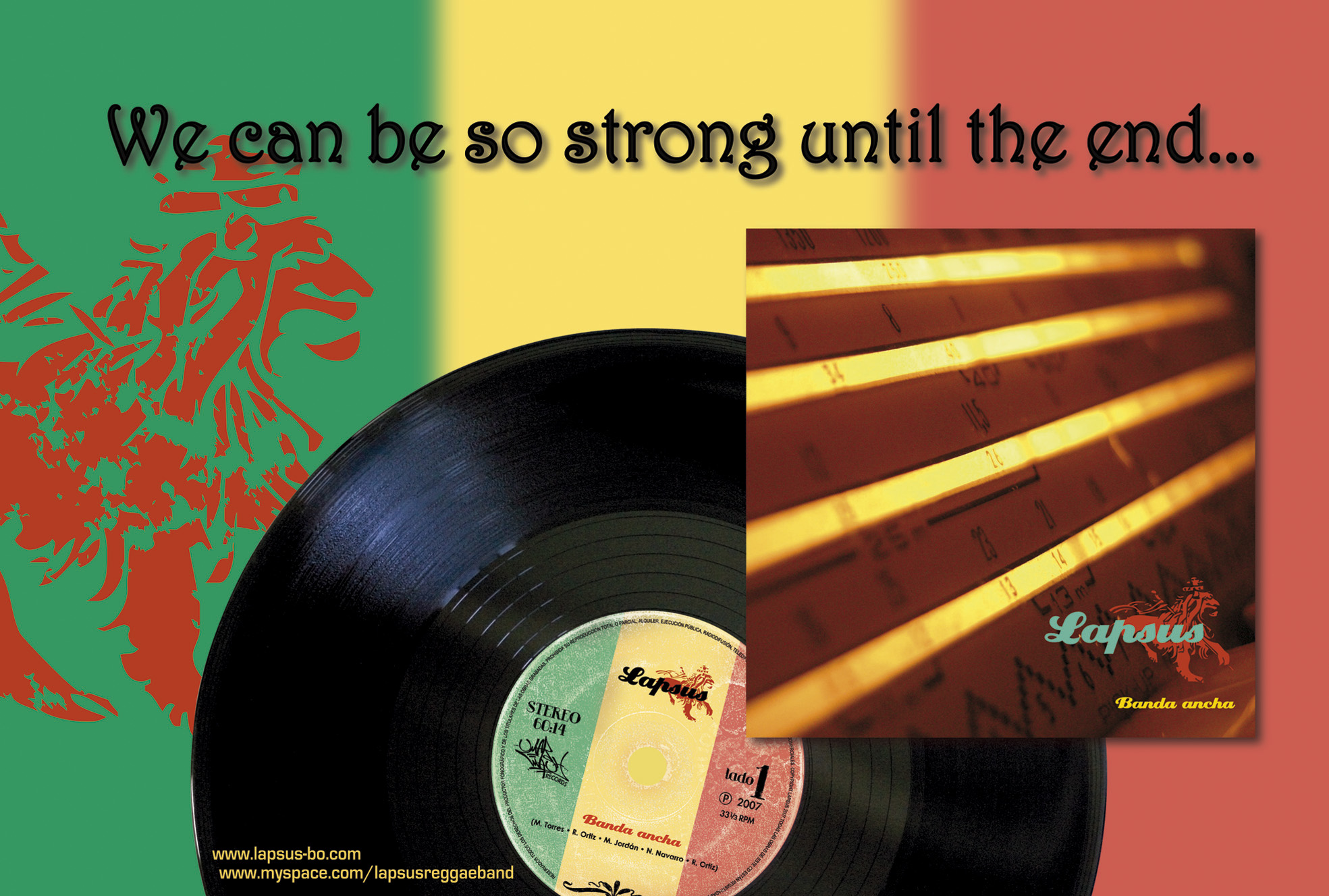 Poster del cd Lapsus Banda Ancha 2007